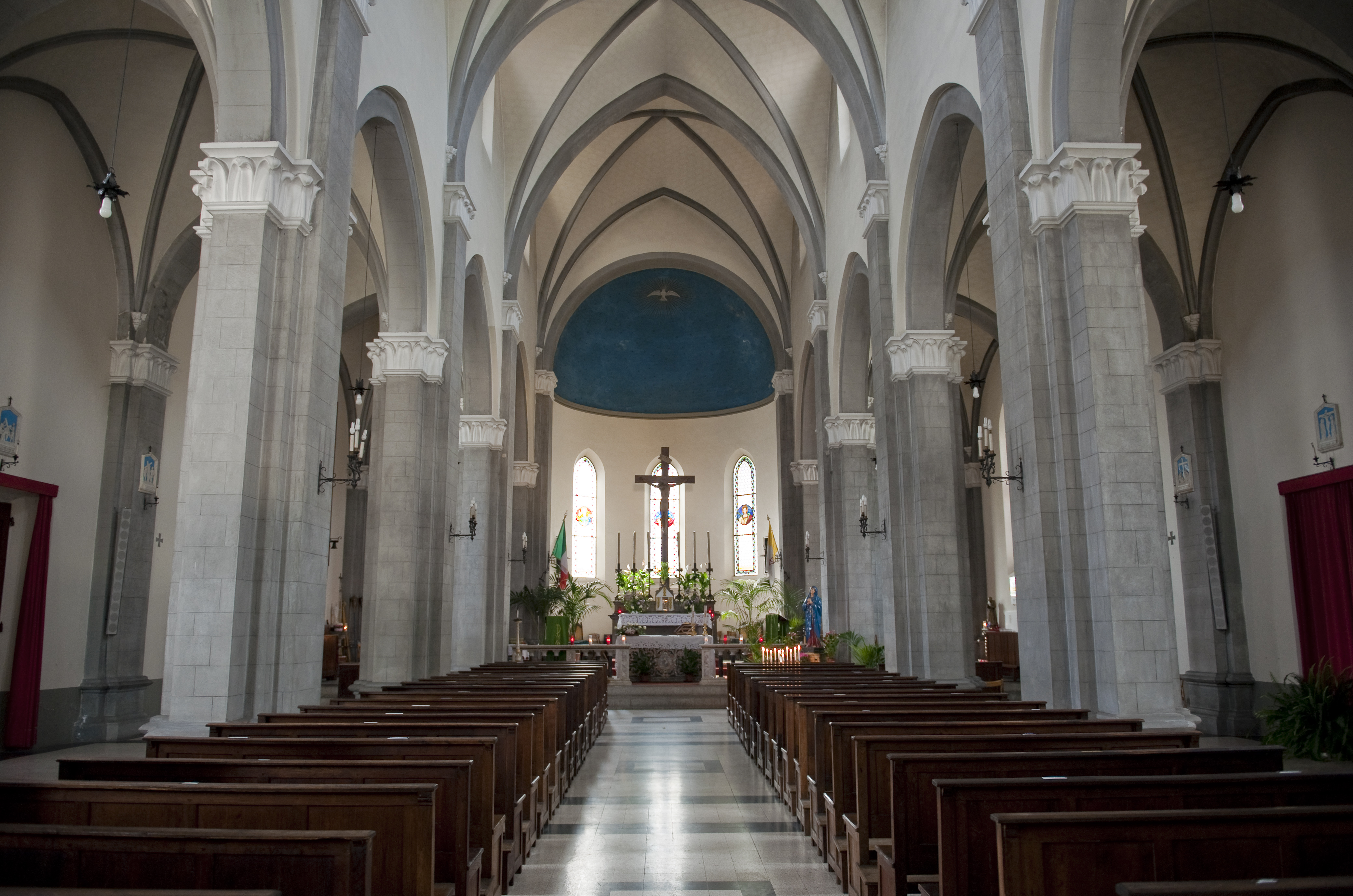 Interno della chiesa di San Sigismondo - Gaiole in Chianti